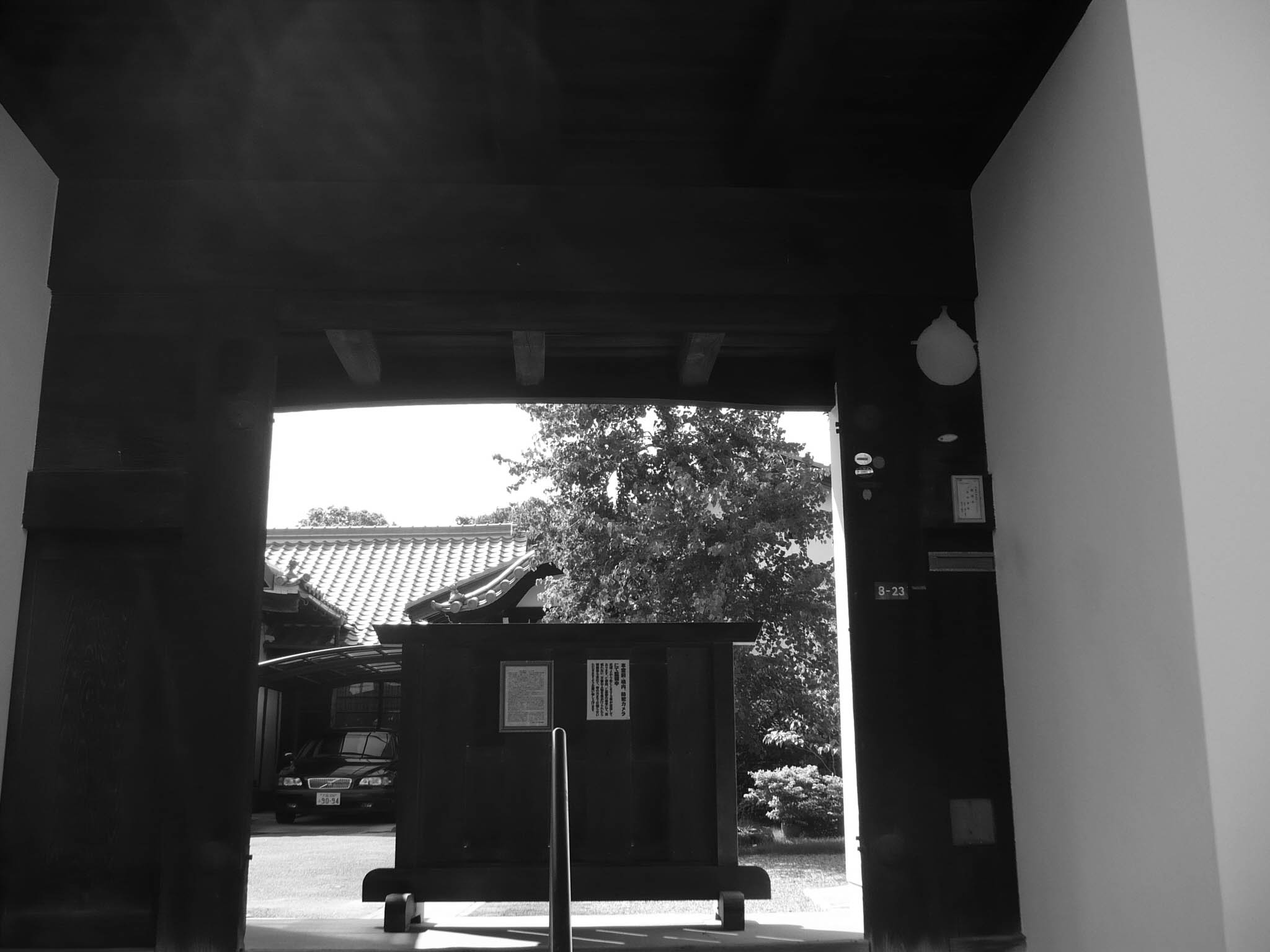 長屋門